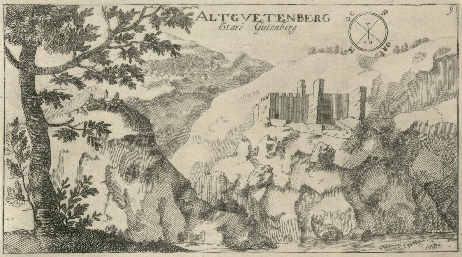 Grad Stari Gutenberg (Altgutenberg)